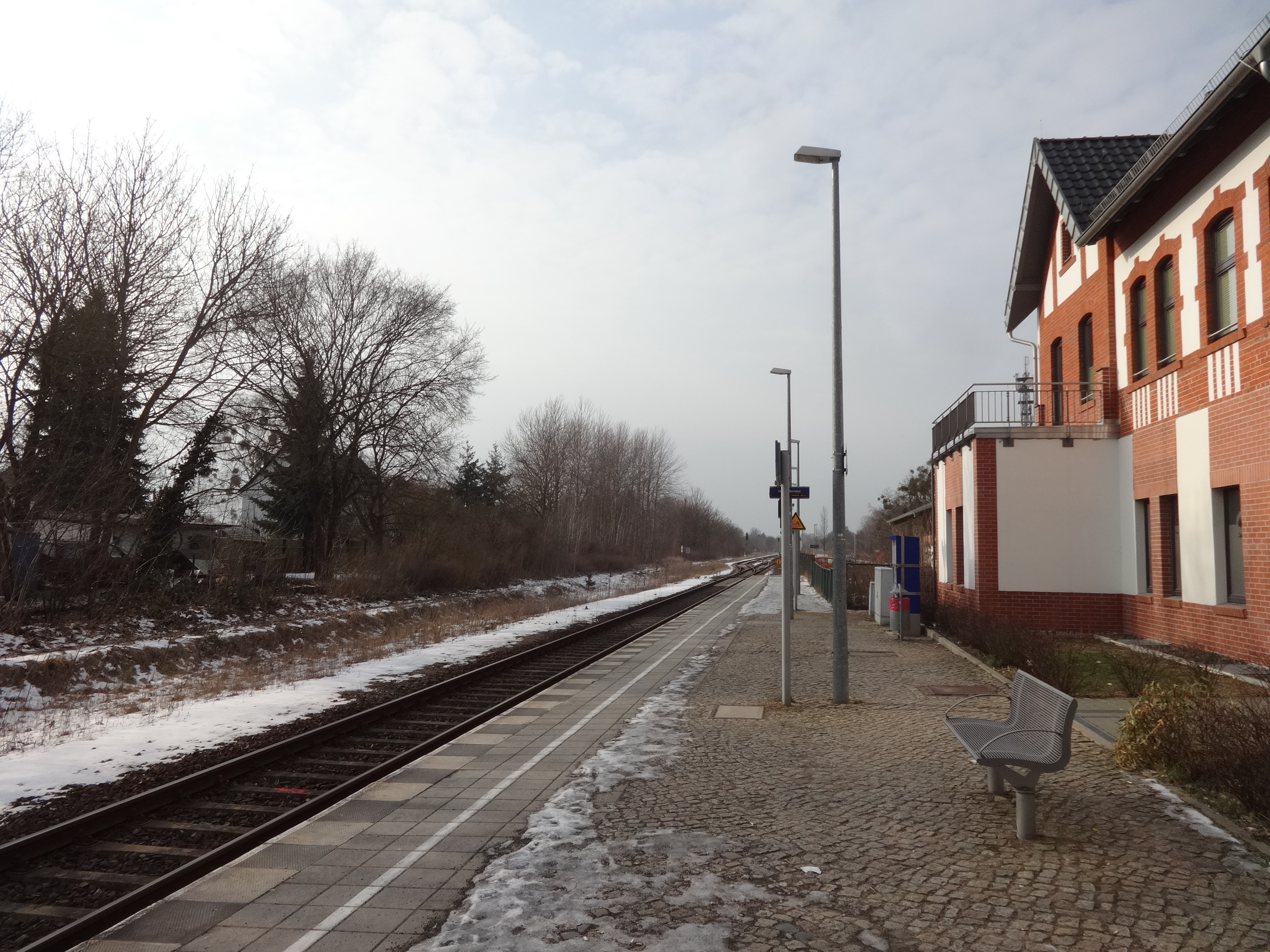 Denkmalgeschütztes Bahnhofsgebäude in Rehfelde aus dem Jahr 1874 im Landkreis Märkisch-Oderland in Brandenburg